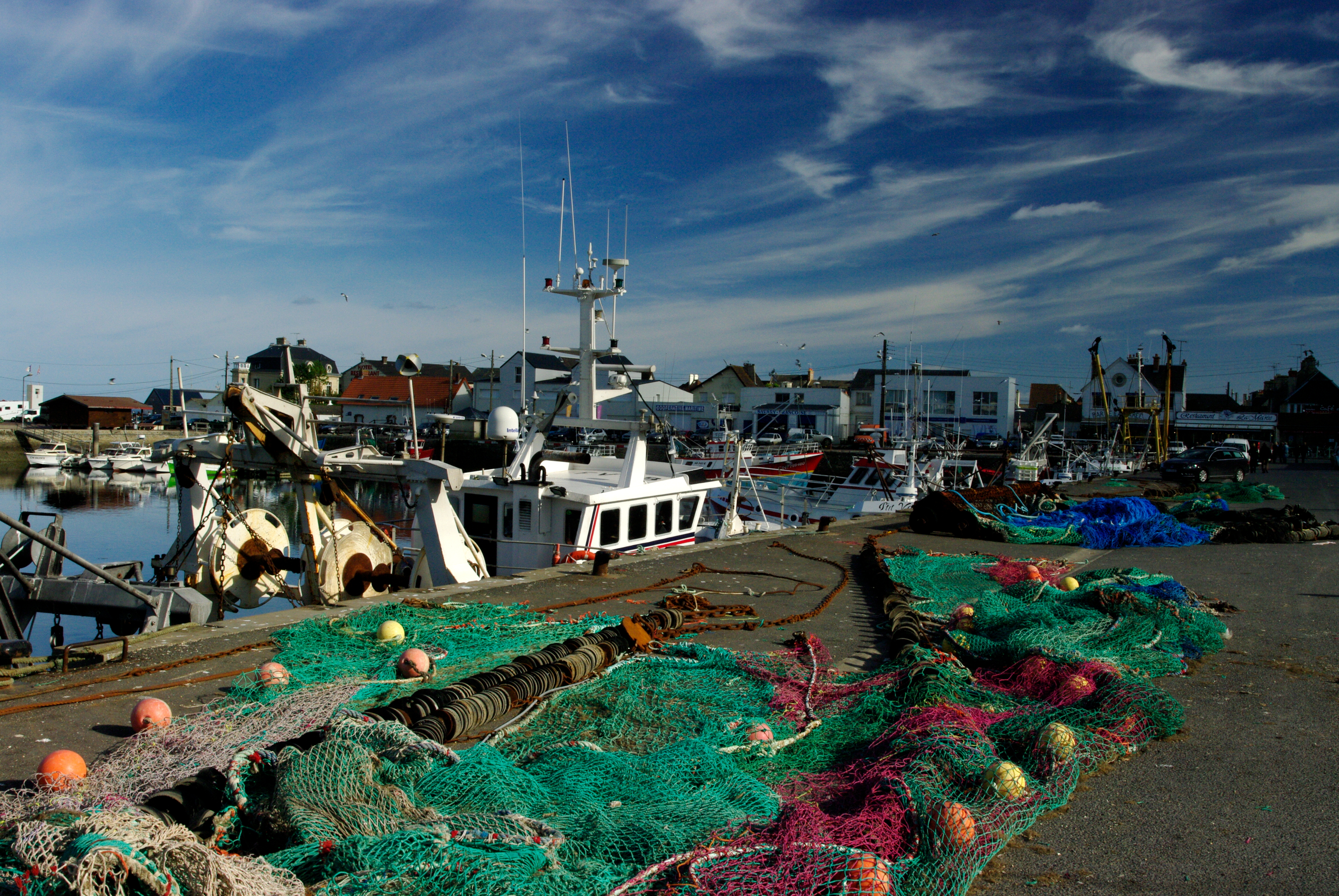 Vue sur le port de pêche un après-midi d'Automne.